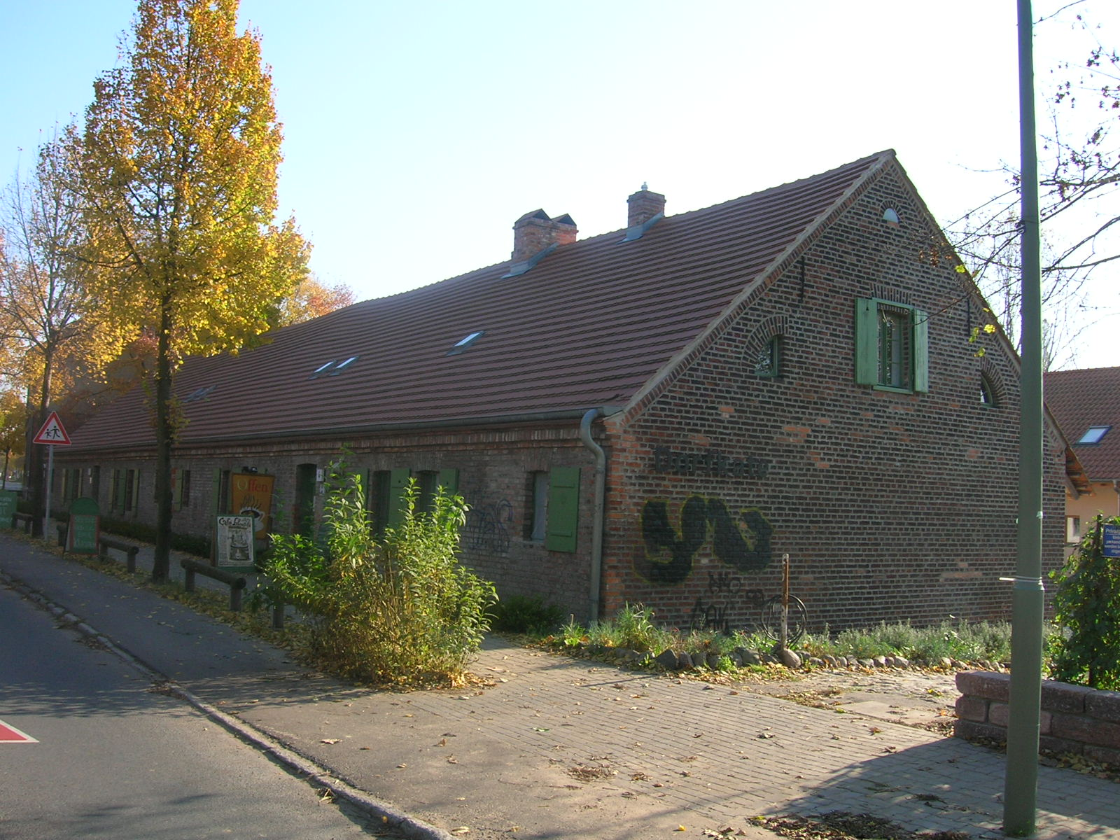 Alte Dorfkate im zu Berlin-Hohenschönhausen gehörenden Dorf Falkenberg